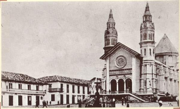 Primera catedral de Manizales en 1900, Caldas, Colombia